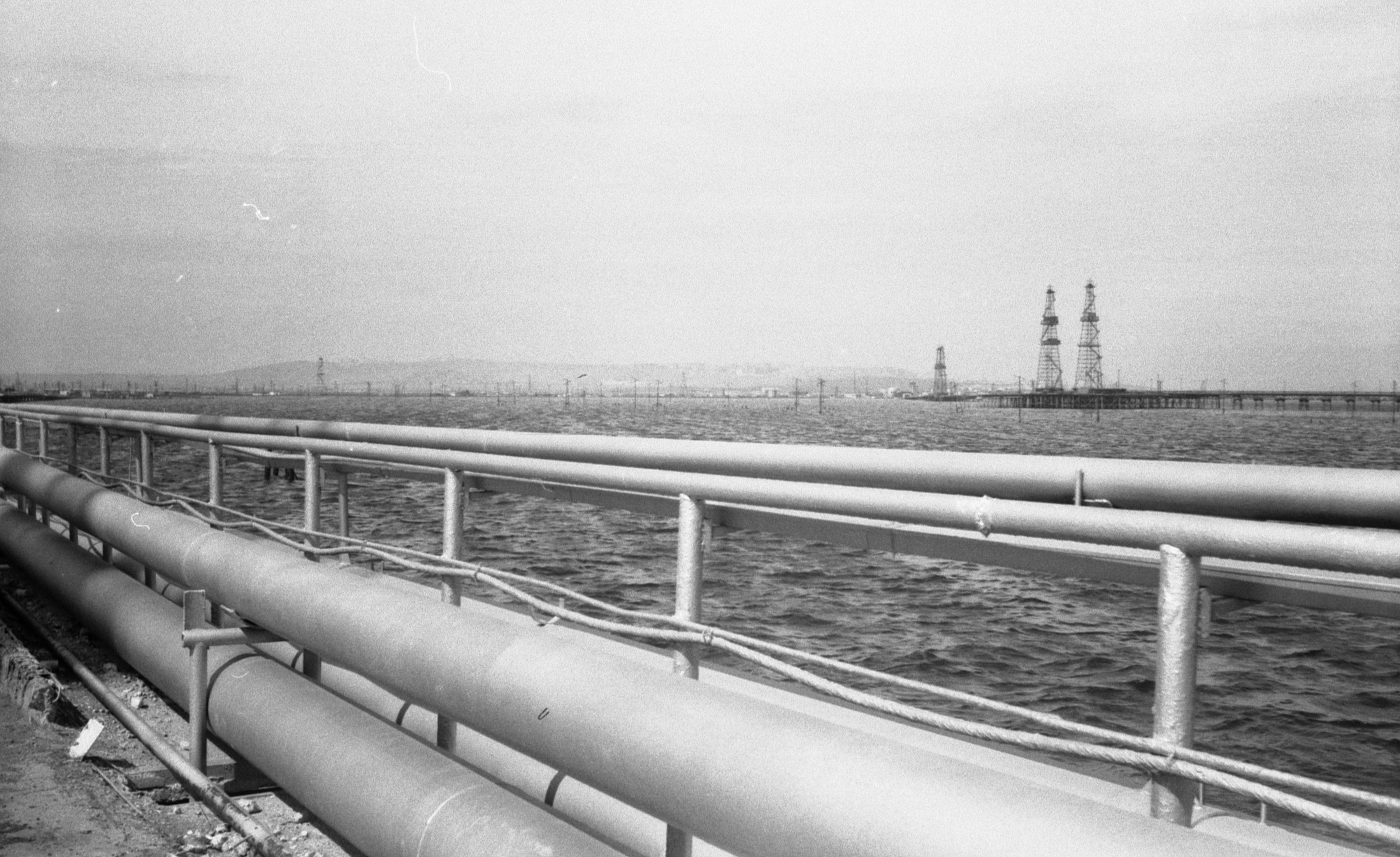 Ölförderanlagen bei Baku Frühjahr 1987